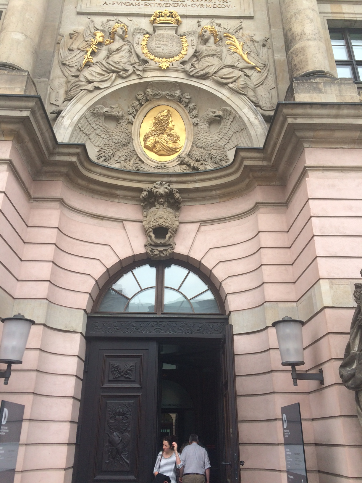 Главный вход в Цейхгауз (Немецкий исторический музей), Берлин